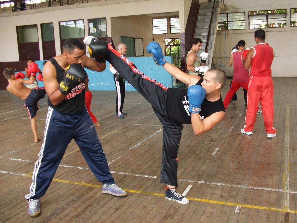 Seminario Internacional de Savate Boxeo Francés. La Habana Cuba. Abril 2008